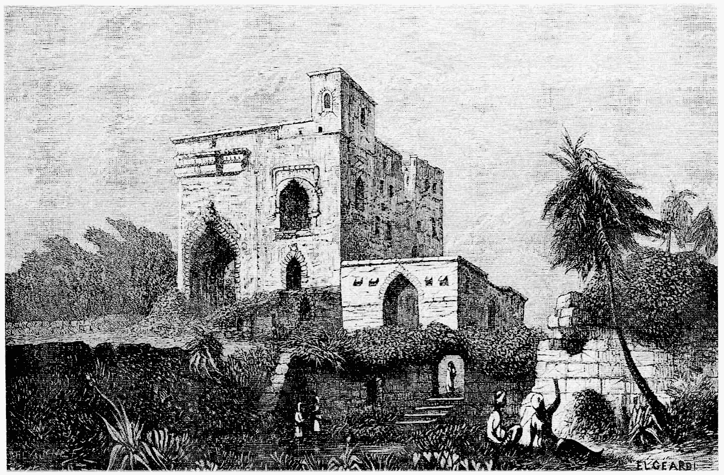 ruines du palais de l’inquisition à goa